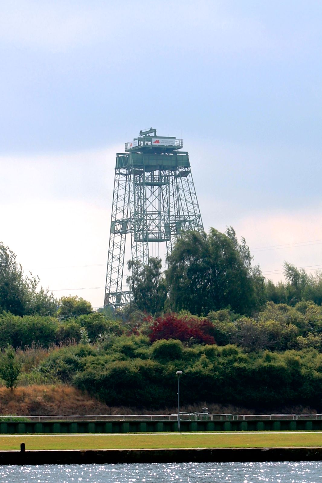 Arbeitsgerüst der Schachtanlage Konrad 2 - Ansicht von Salzgitter-Bleckenstedt